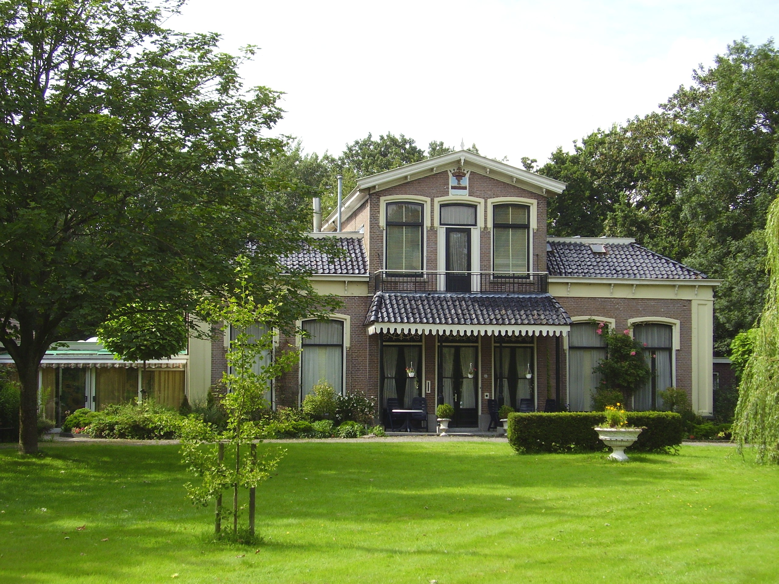 De Walburgastate in Sexbierum in de gemeente Franekeradeel (province of Friesland, the Netherlands)